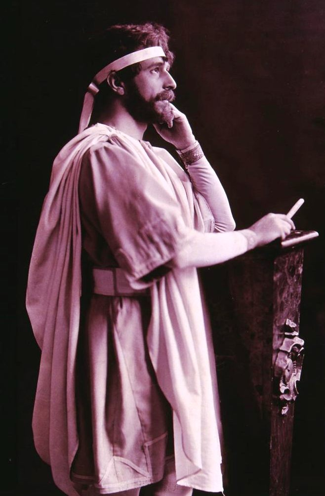 Dalnoki Viktor magyar operaénekes (bariton) és -rendező.